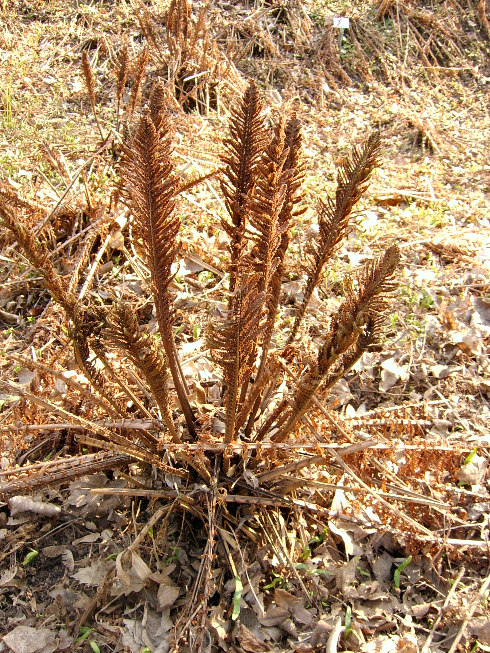 dead Matteuccia struthiopteris